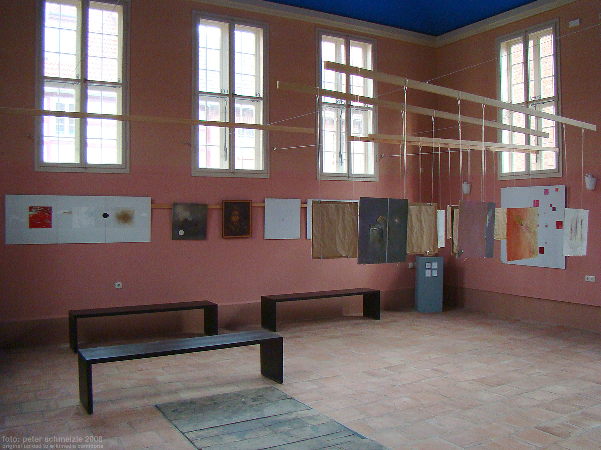 Ehemalige Synagoge in Röbel, Inneres heute Ausstellungsfläche